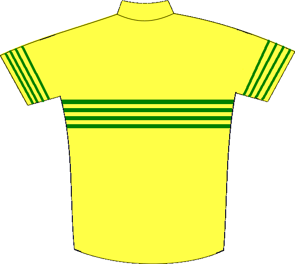 colores del jersey del Club Ciclista Amanecer, Uruguay